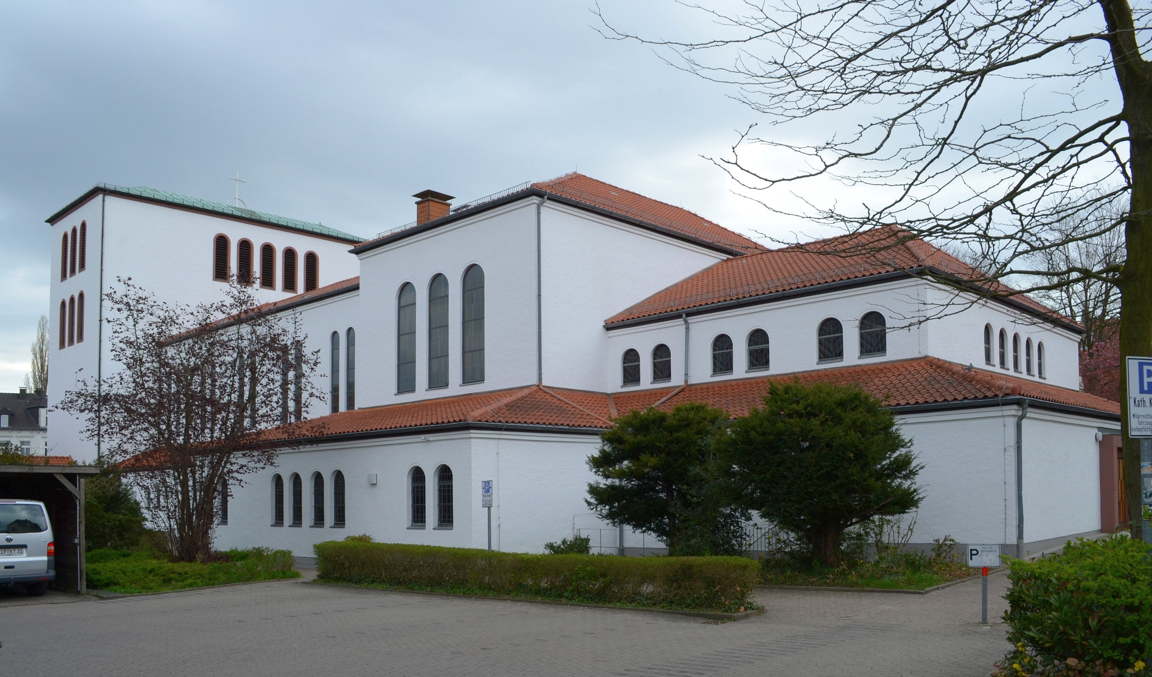 Baudenkmal Detmold Nr. 650 - Katholische Pfarrkirche Heilig-Kreuz Schubertplatz 10